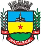 Brasão de Apucarana